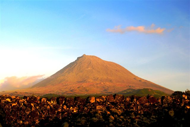 Montanha do Pico ao Pôr-do-sol, ilha do Pico, Açores